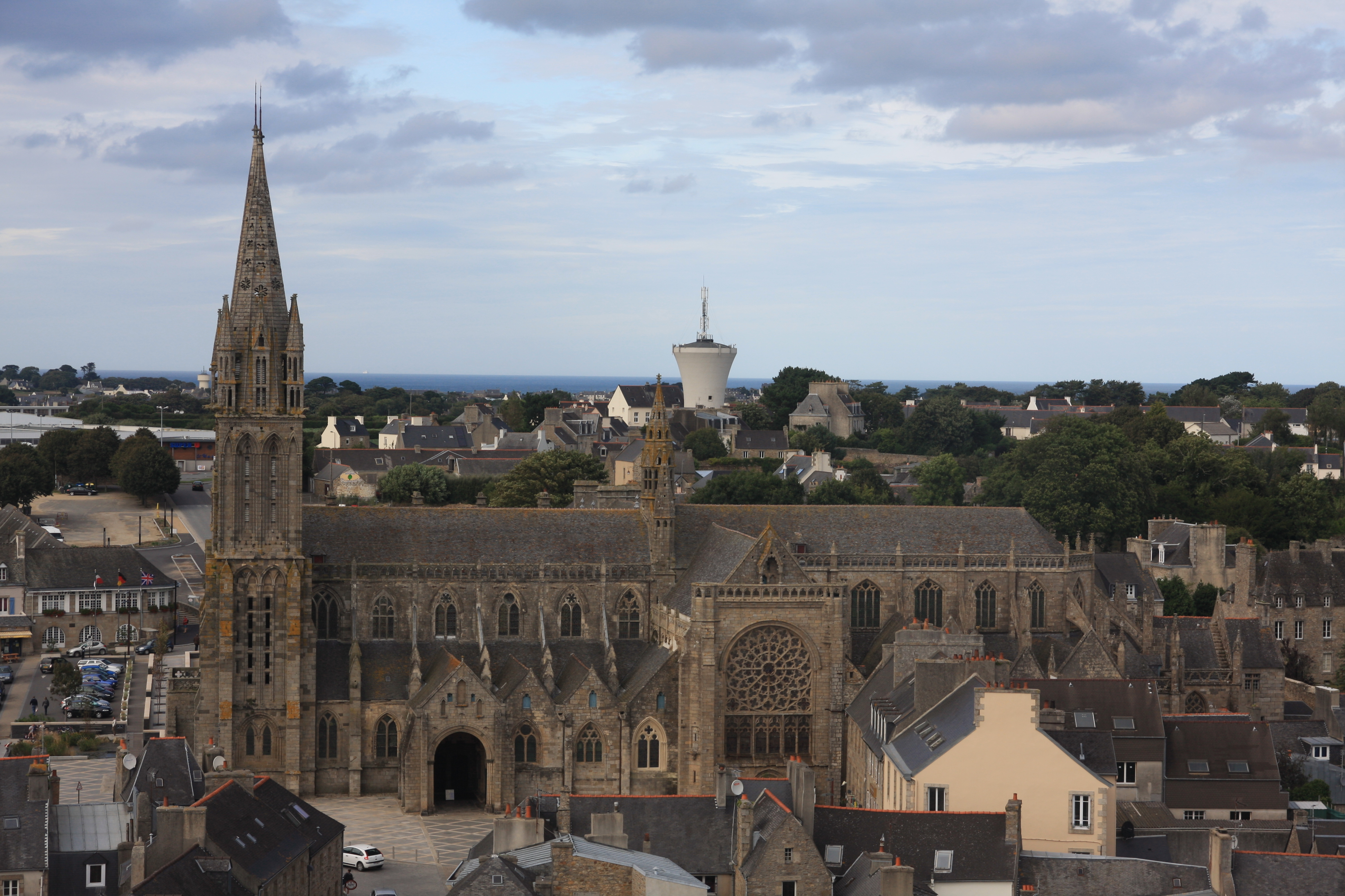 Saint-Pol-de-Leon : Saint-Paul-Aurelien